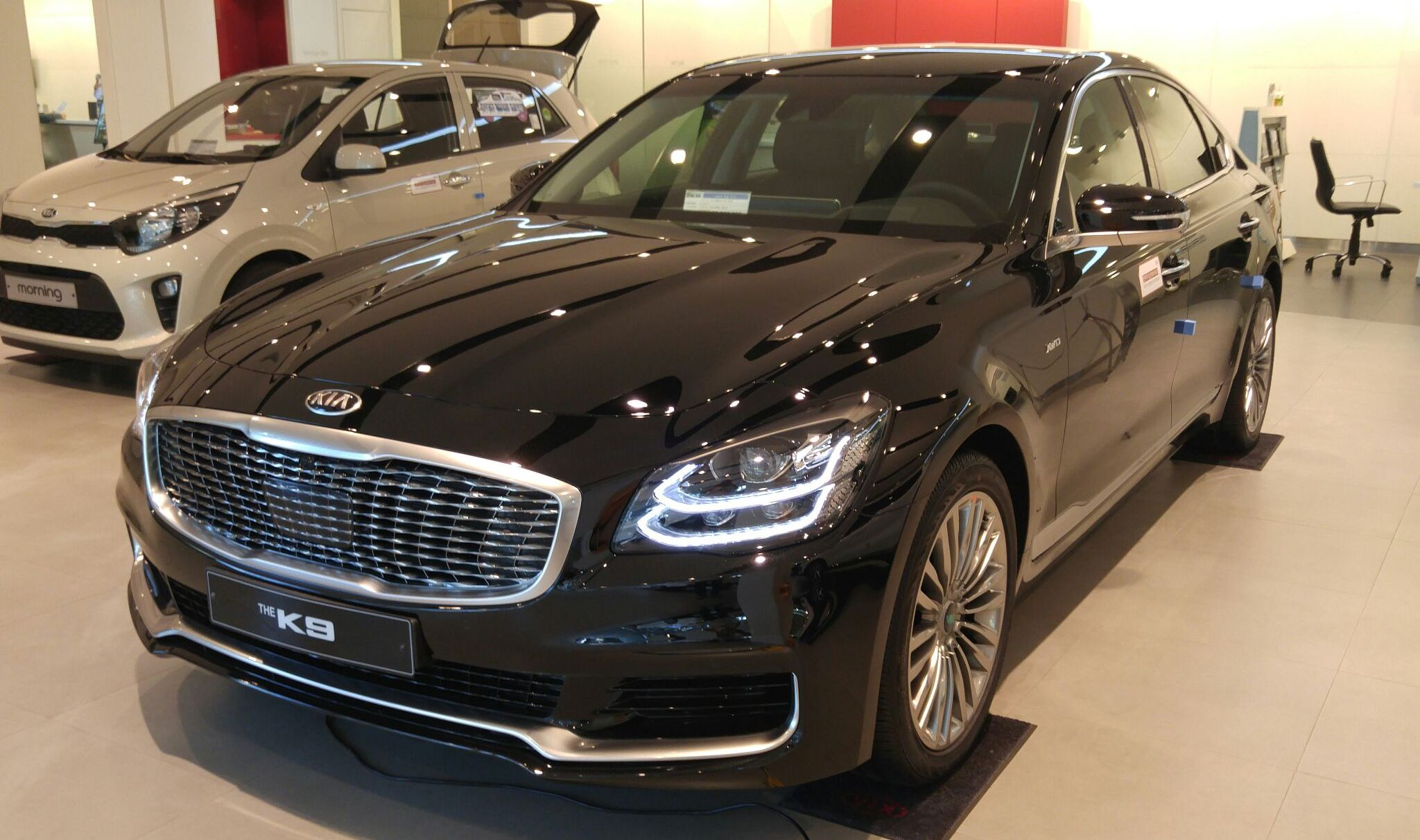 キア・K9